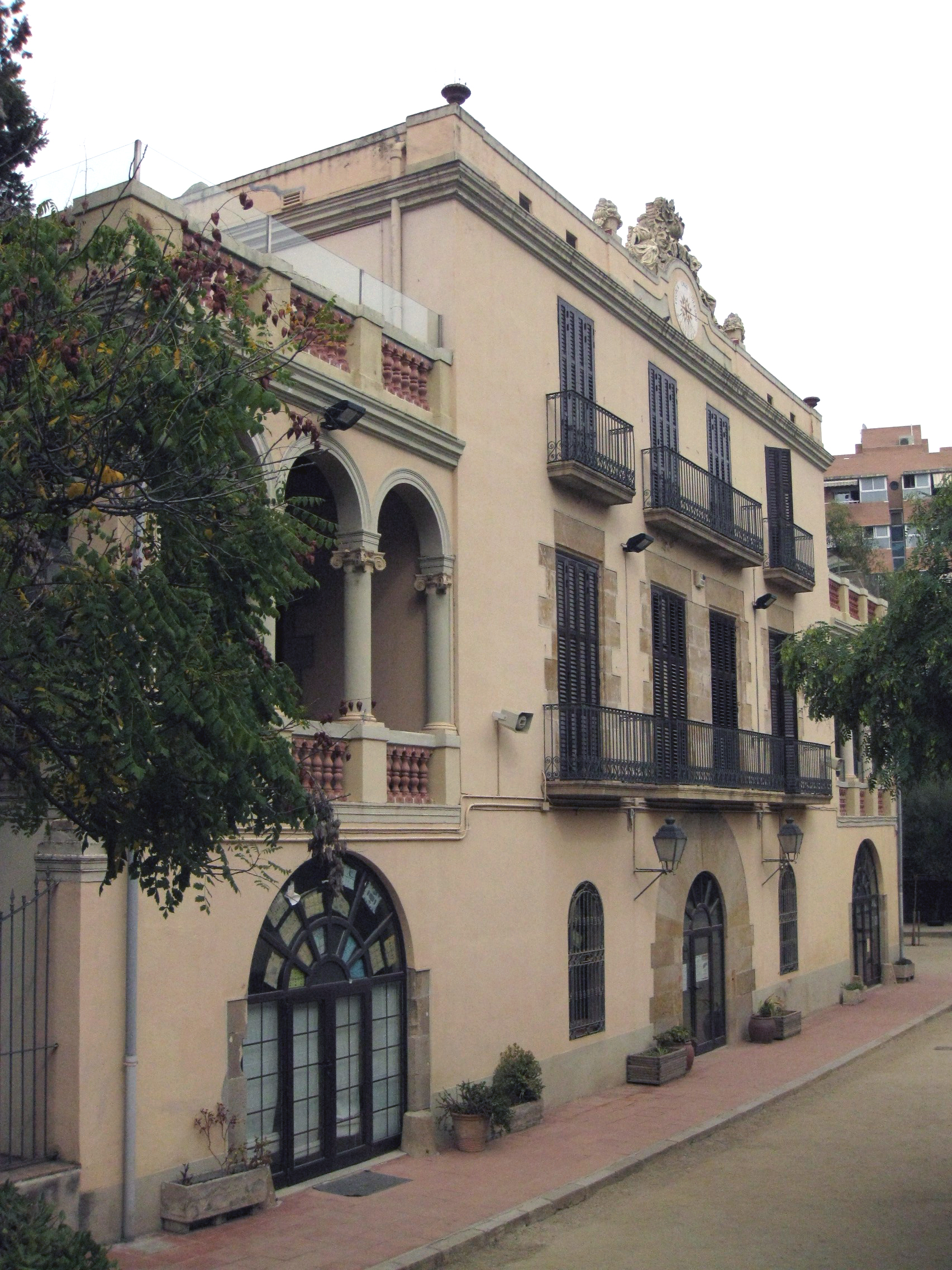 Grup escolar Ignasi Iglésias, conegut com «les Carasses», antiga masia neoclàssica del segle XVII al passeig de Torras i Bages, núm. 108 (Sant Andreu, Barcelona). Remodelada al segle XIX, des del 1931 allotja l'escola Ignasi Iglésias.